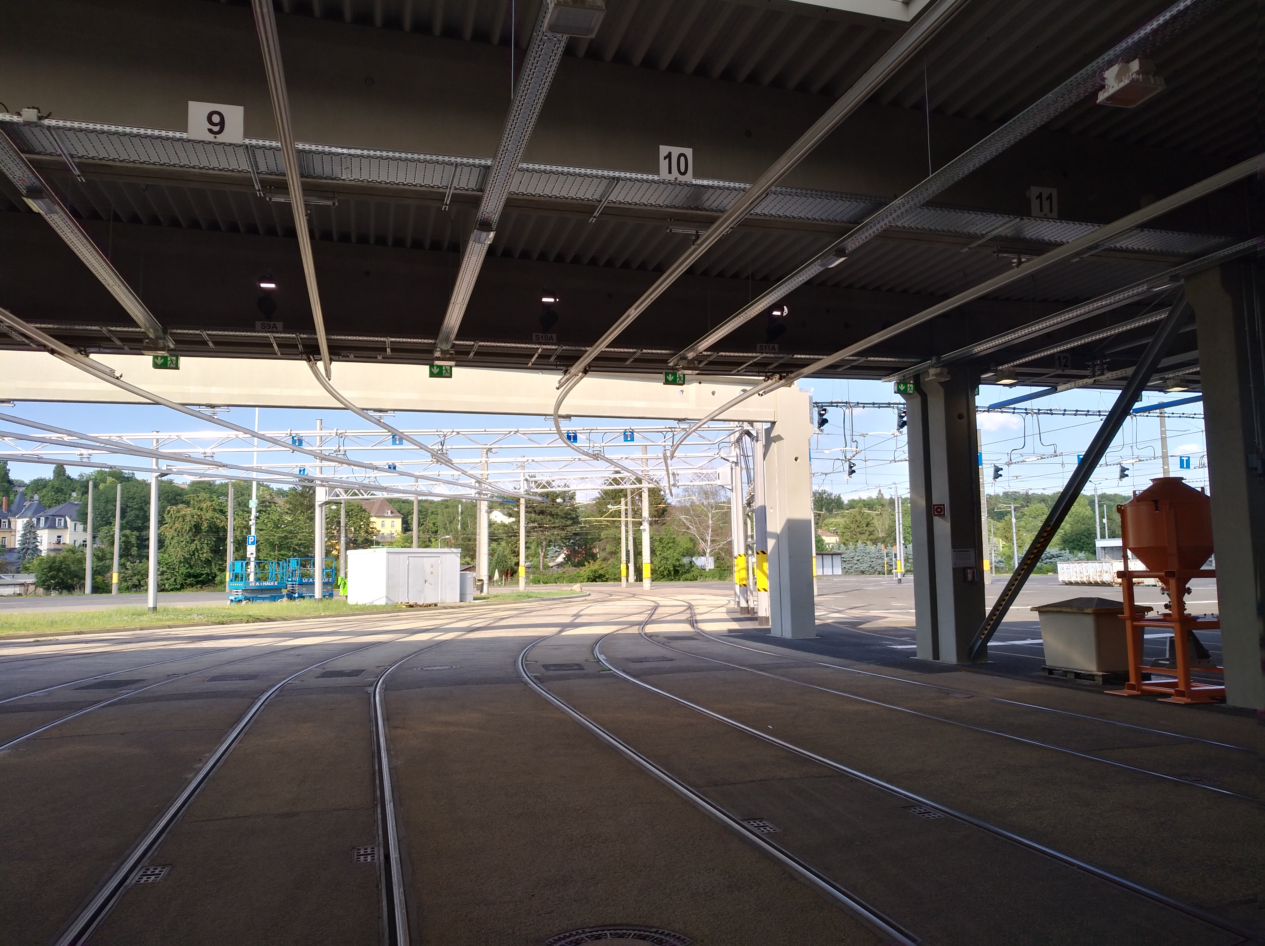 Neubau Straßenbahnhof Trachenberge mit Deckenstromschienen